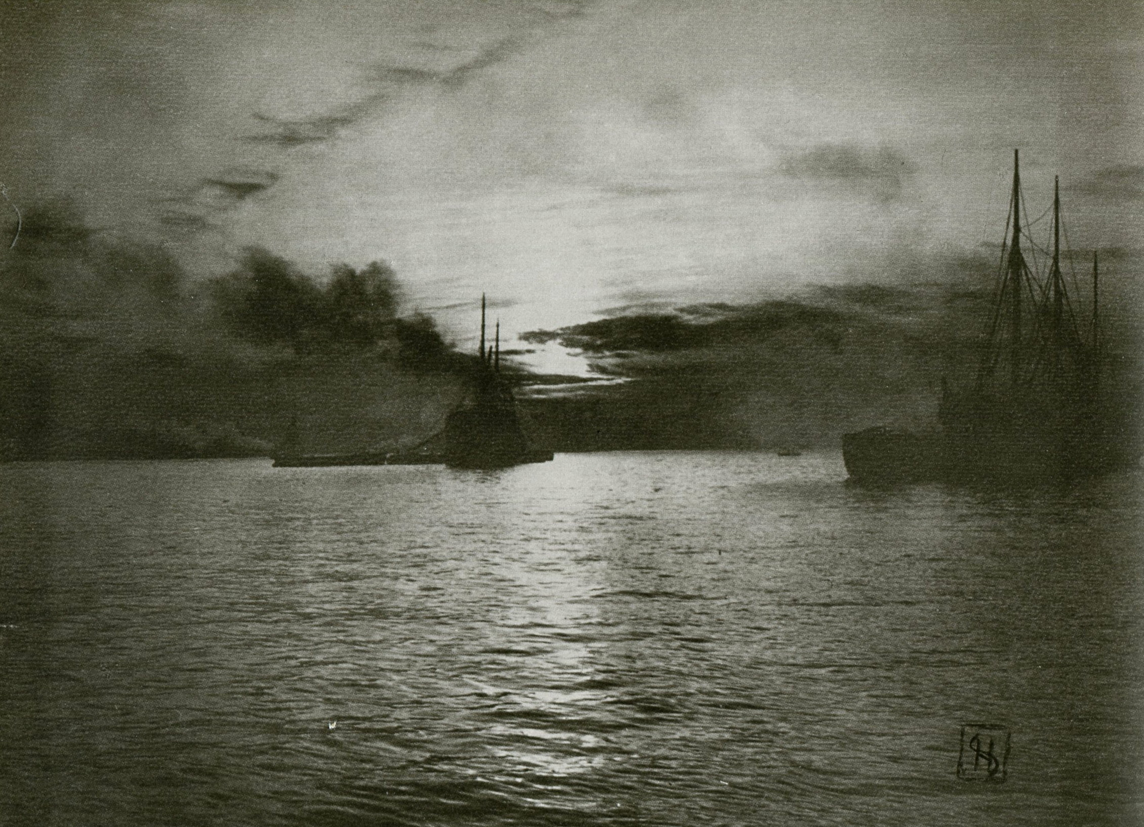 Solnedgång över Stockholms ström